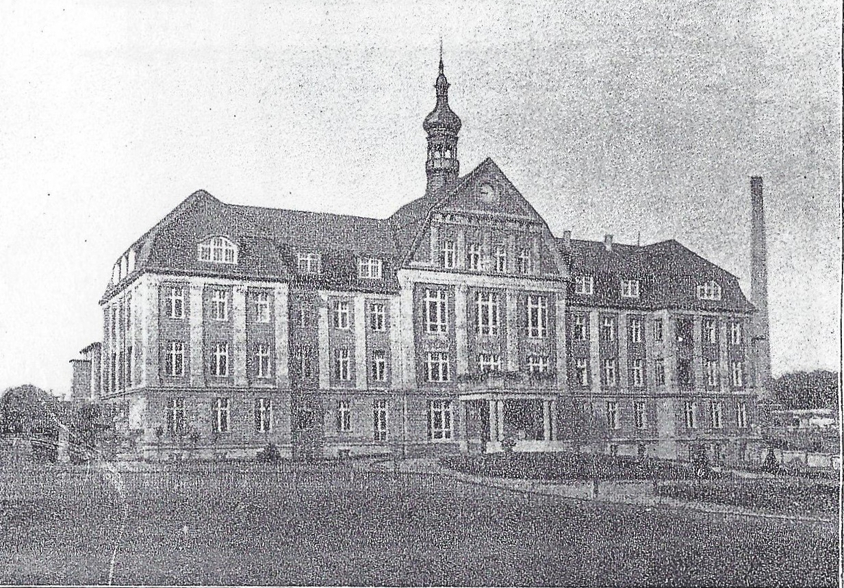 Fotografie des Städtischen Krankenhauses Danzig.